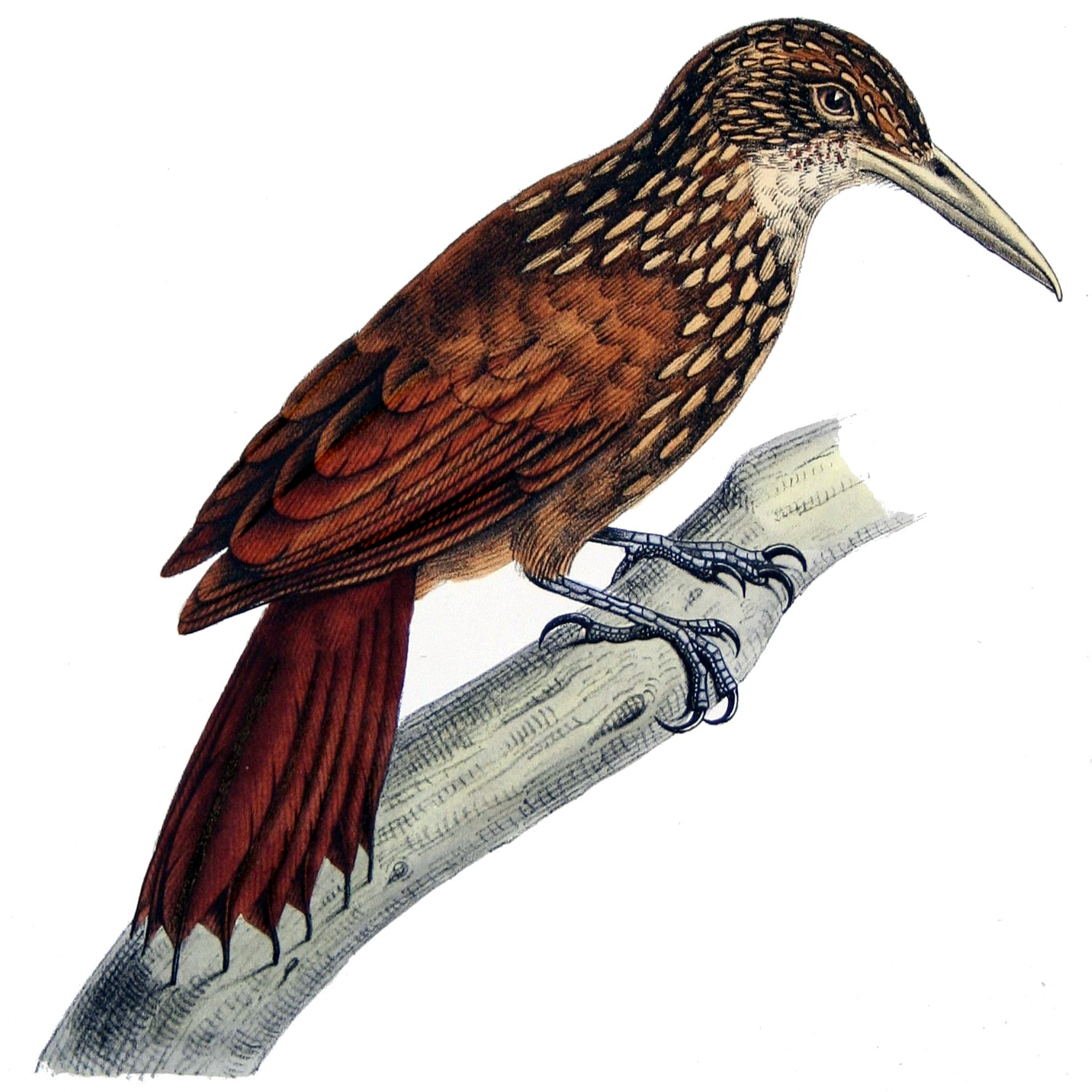 Dendrornis rostripallens de la Fres = Xiphorhynchus guttatus (Lichtenstein, 1820)